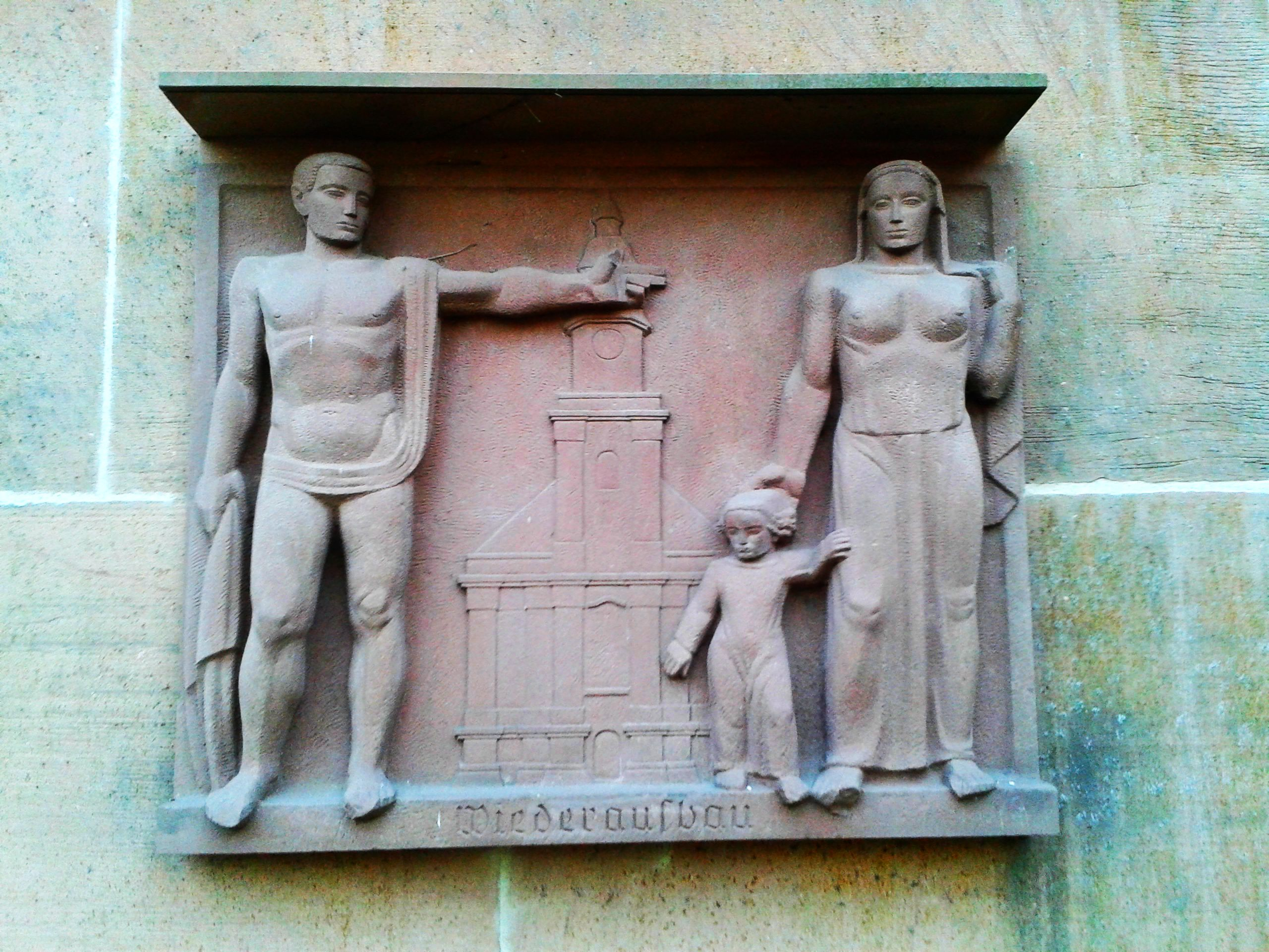 Platz der Partnerschaft - Relief5